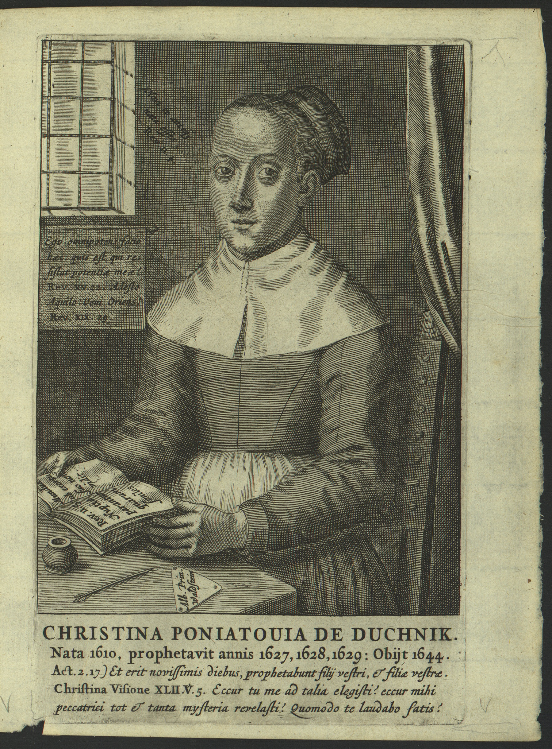 Mědirytinový portrét Krystyny Poniatowské z r. 1665